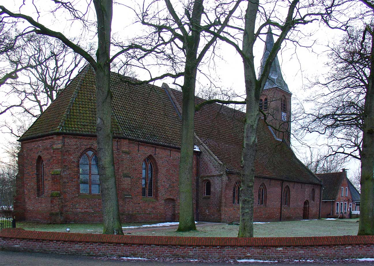 De Catharinakerk van Roden in Drenthe